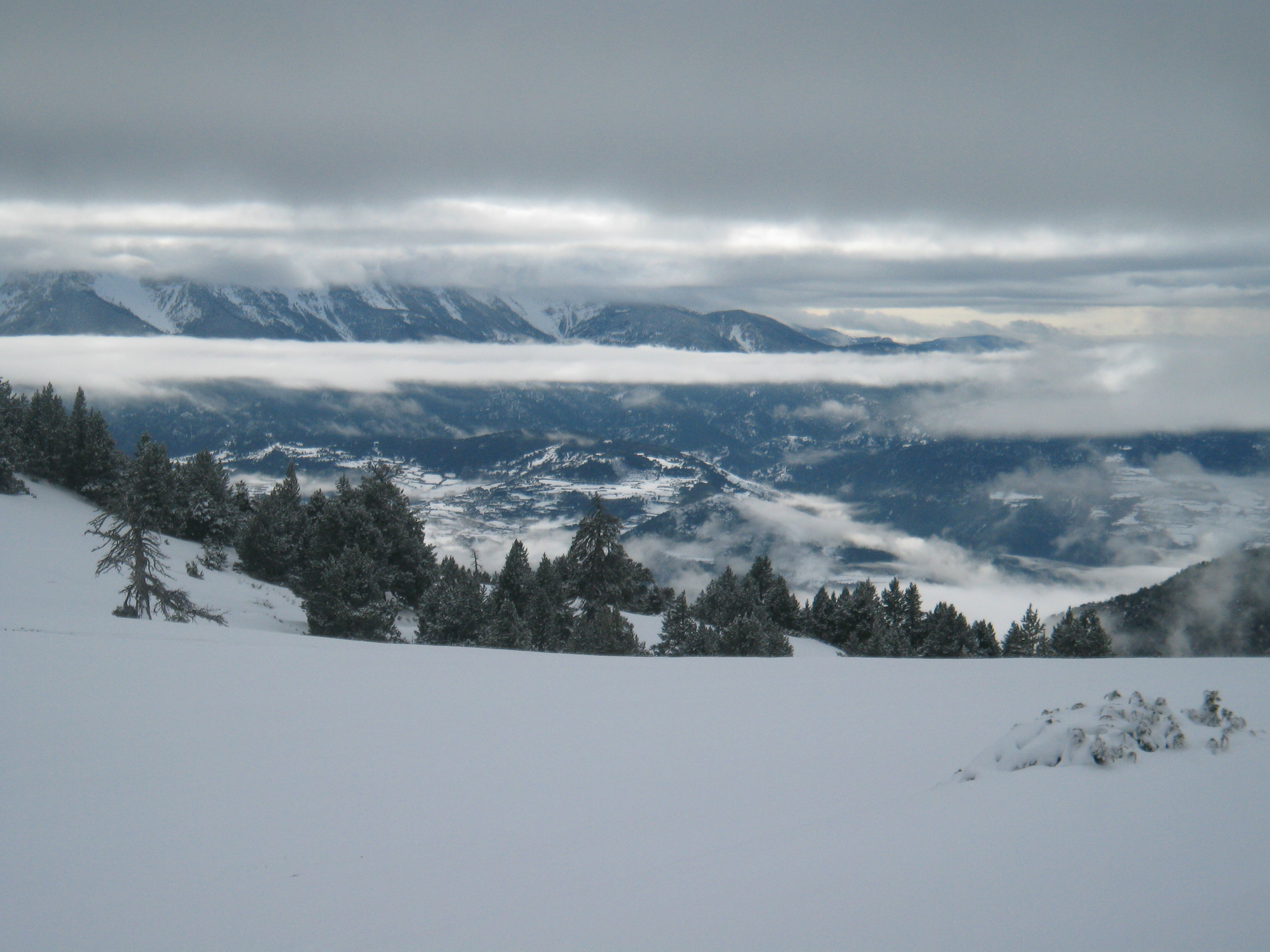 Panoràmica de l'Alt Urgell i la Cerdanya des d'un prat a l'estació d'Aransa (Lles de Cerdanya)